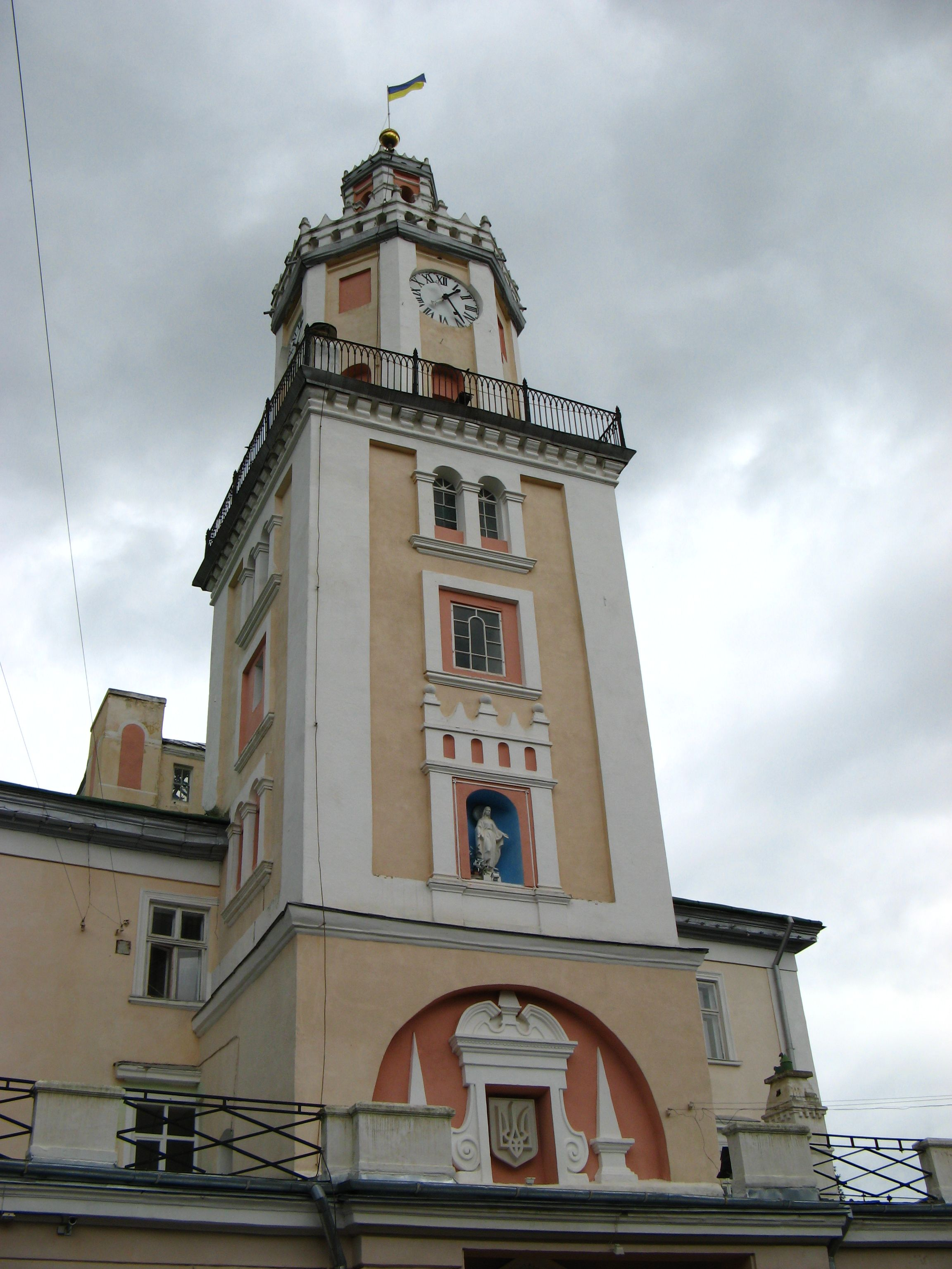 Sambir-ratusha-3.jpg: Самбірська ратуша (Львівська обл.)